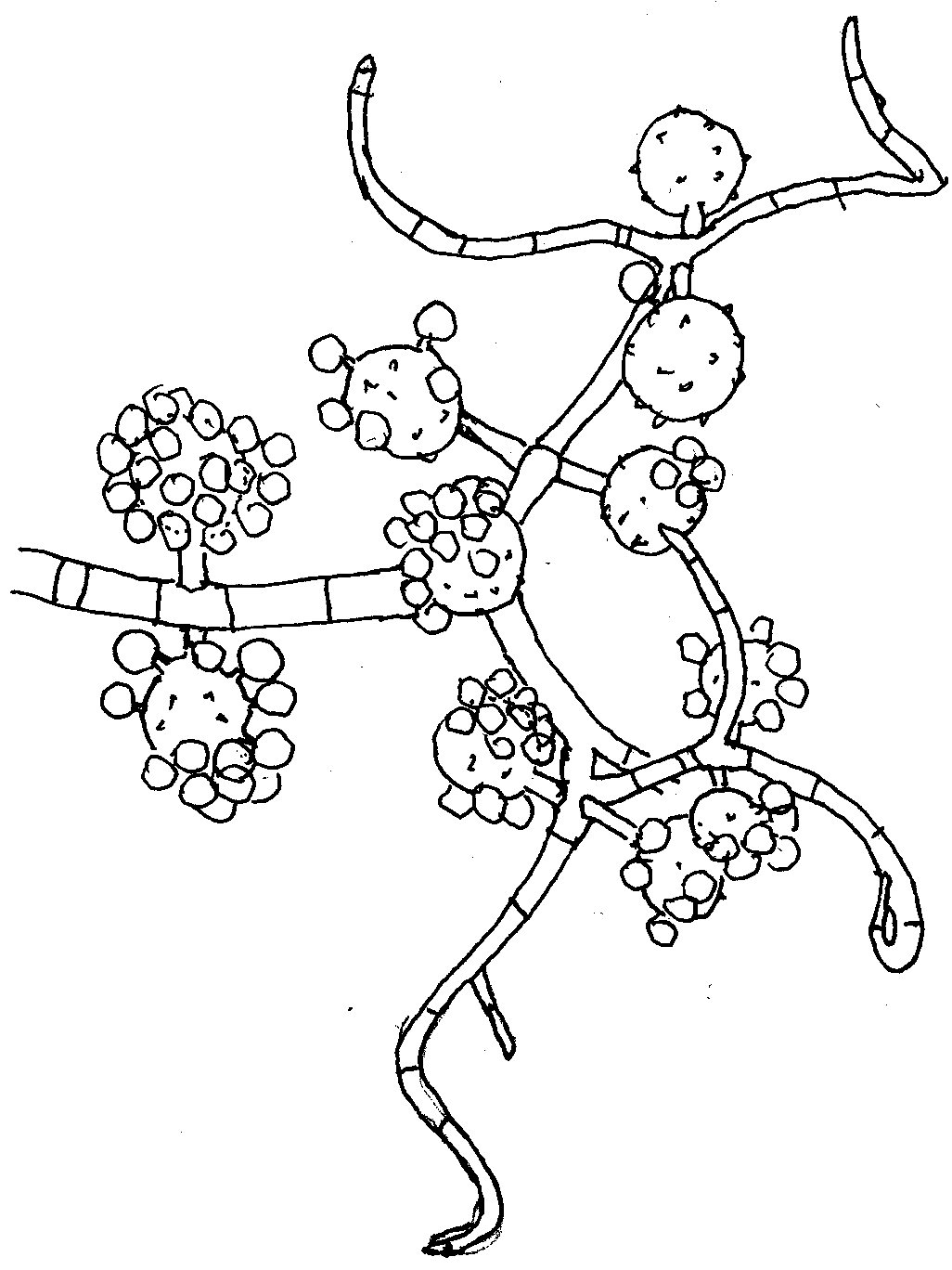 Benny et al.(1992) Mycologia 85(4)より模写